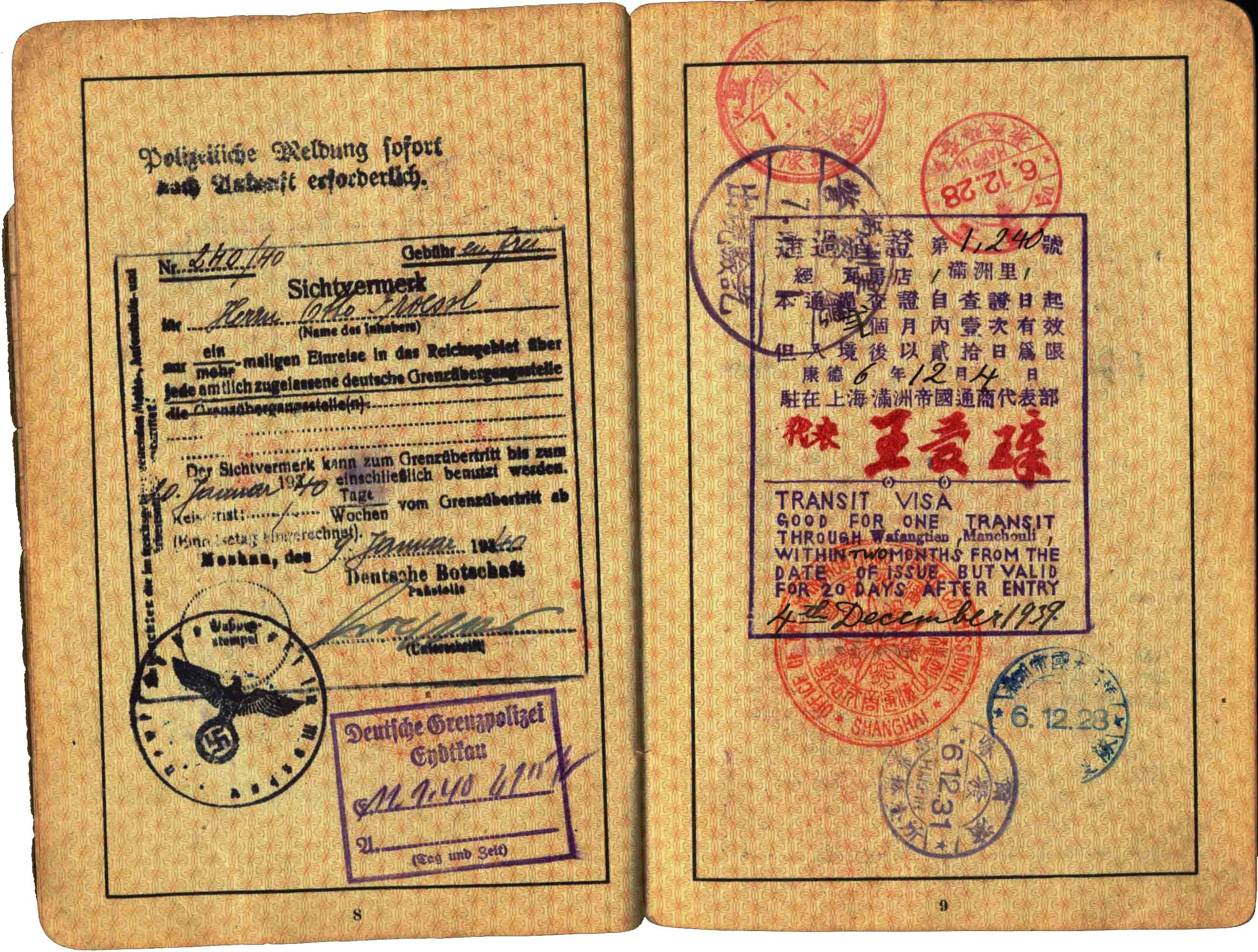 ויזת כניסה למנצ'וריה משנת 1939 שניתנה ע"י הנציגות הכלכלית של מנצ'וריה בשנגחאי